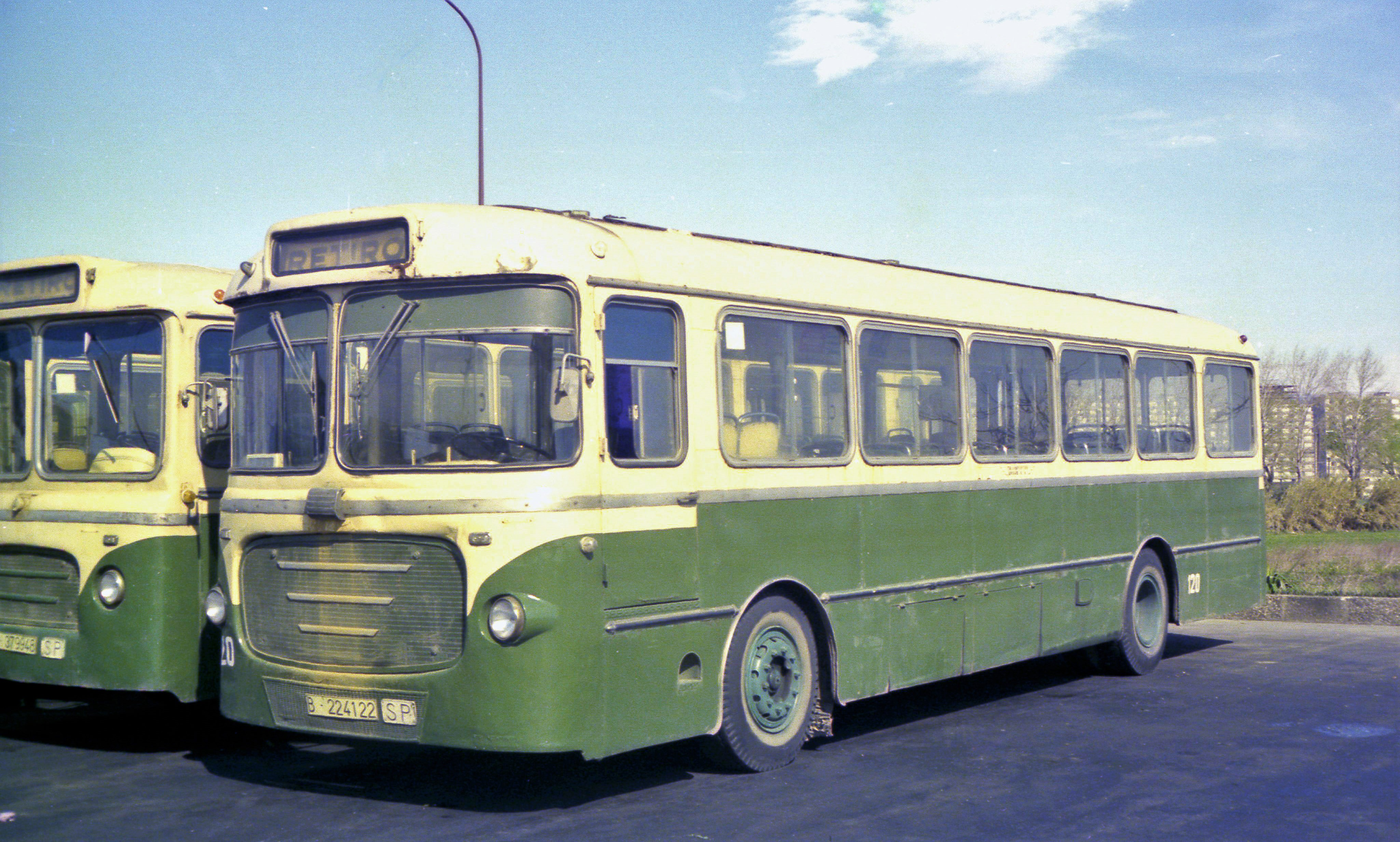 El autobús Pegaso 5020 con carrocería de Seida, número 120 de Urbanizaciones y Transportes, en las cocheras de Poniente.